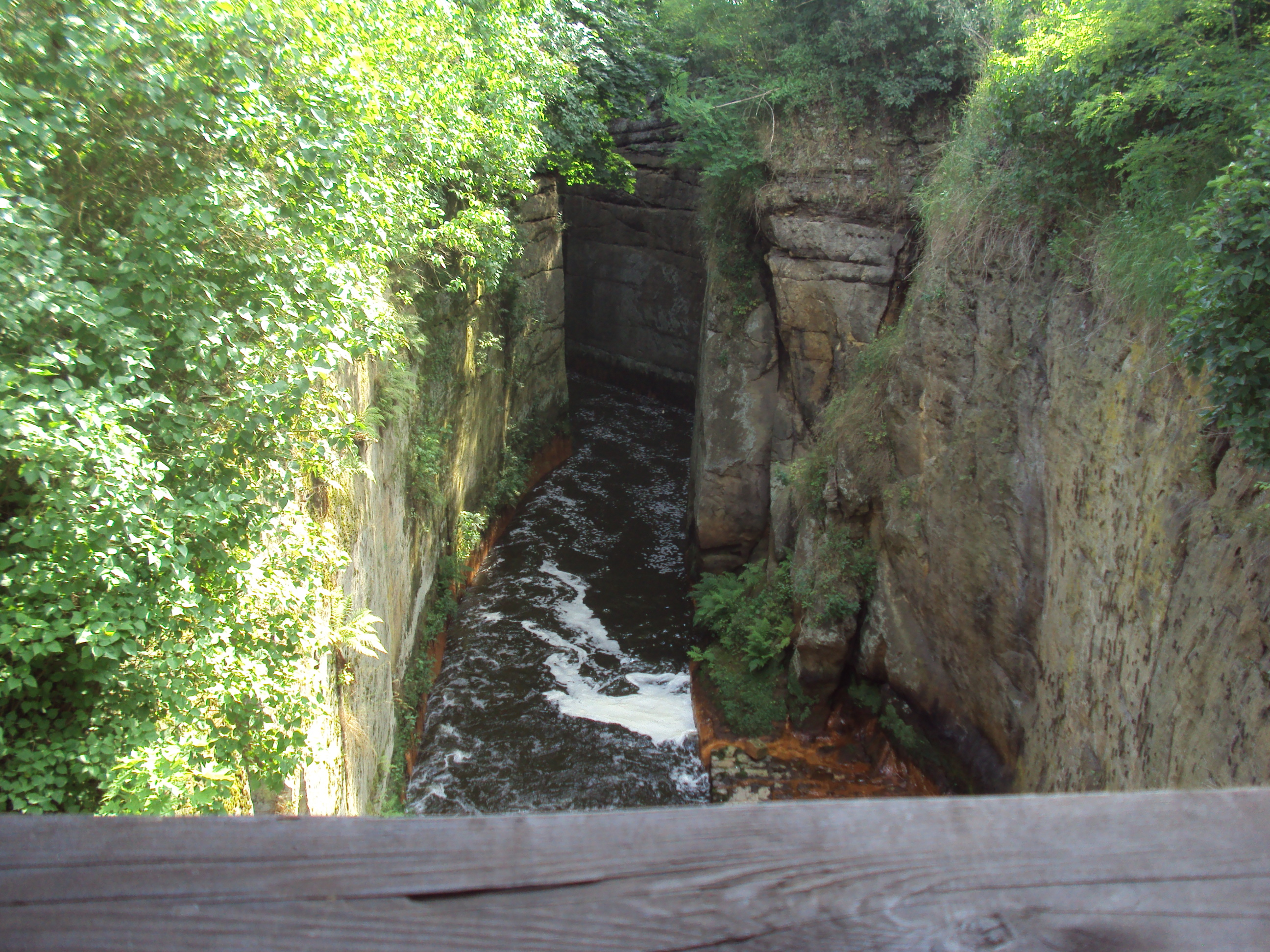 Průrva u Novozámeckého rybníka je technickou i kulturní památkou